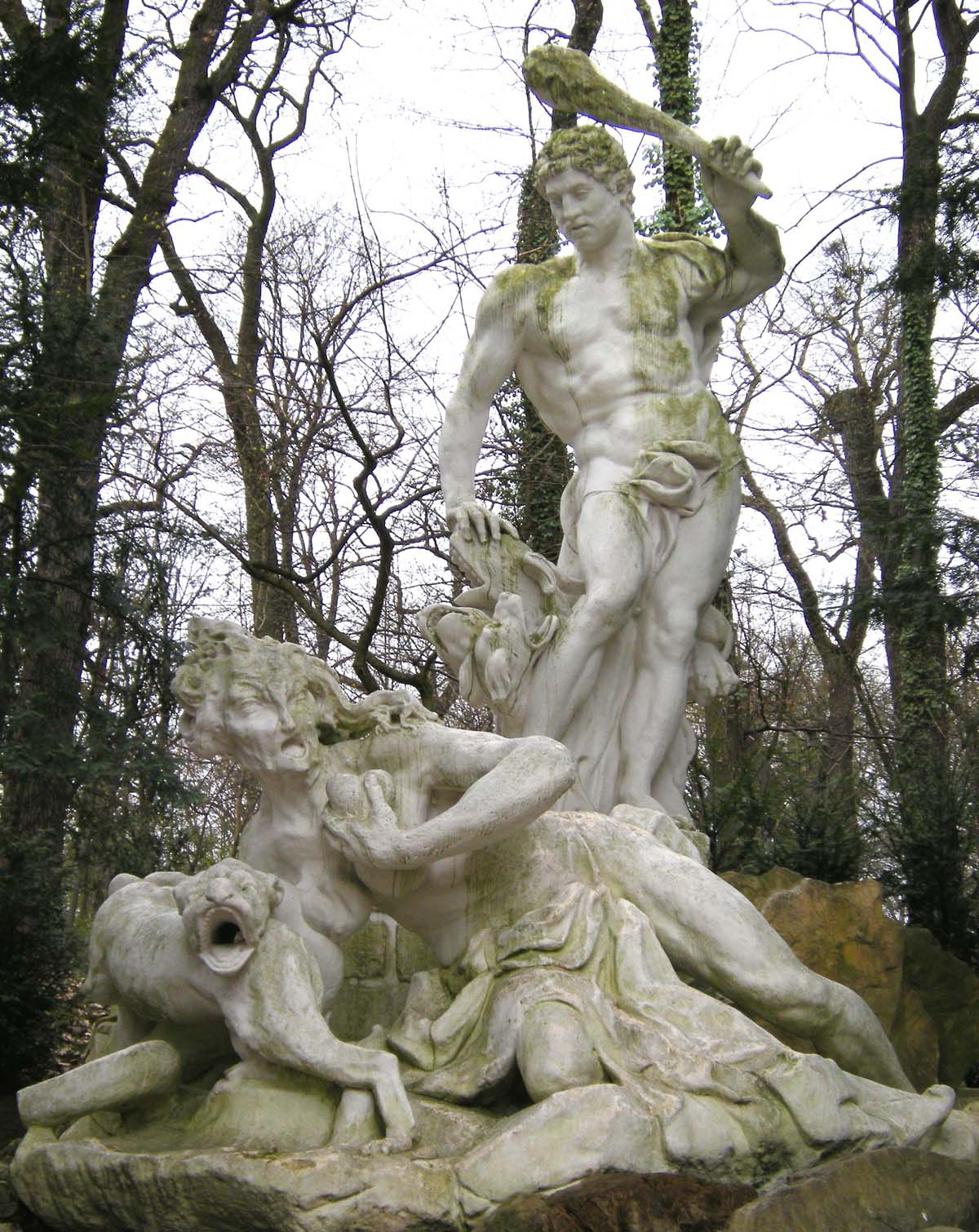 Herakles Statue.